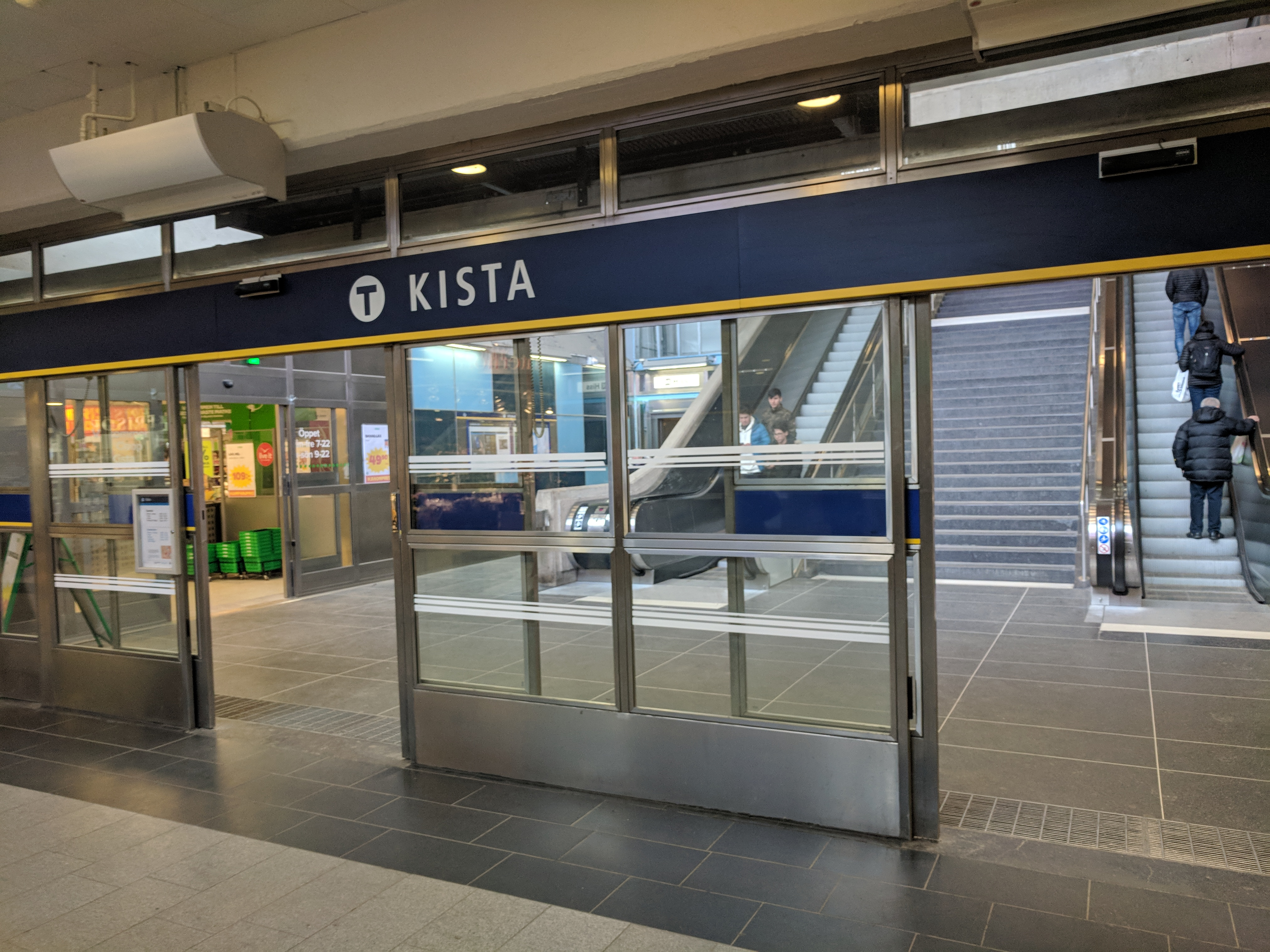 Kista metro